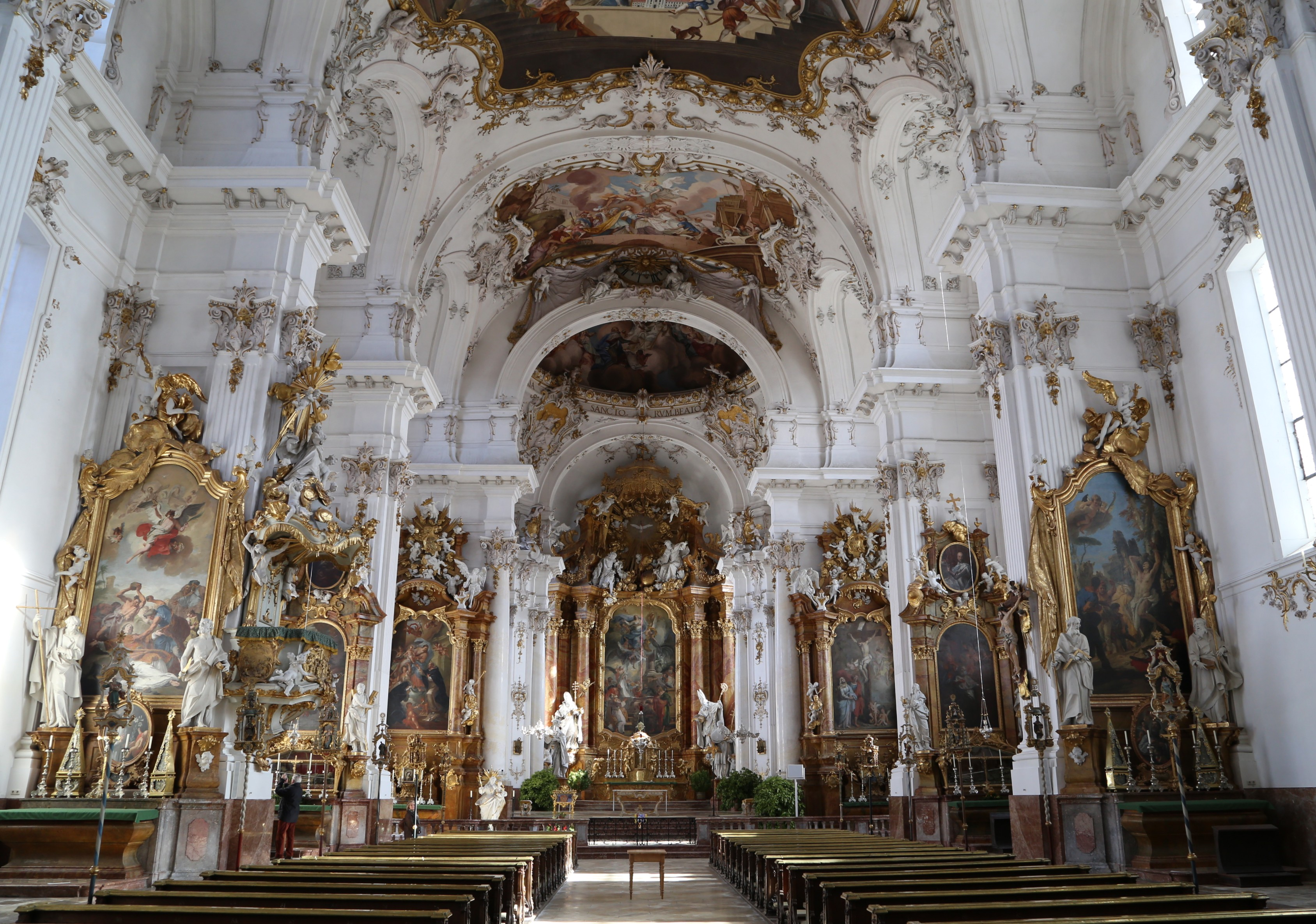 Innenraum Marienmünster Dießen